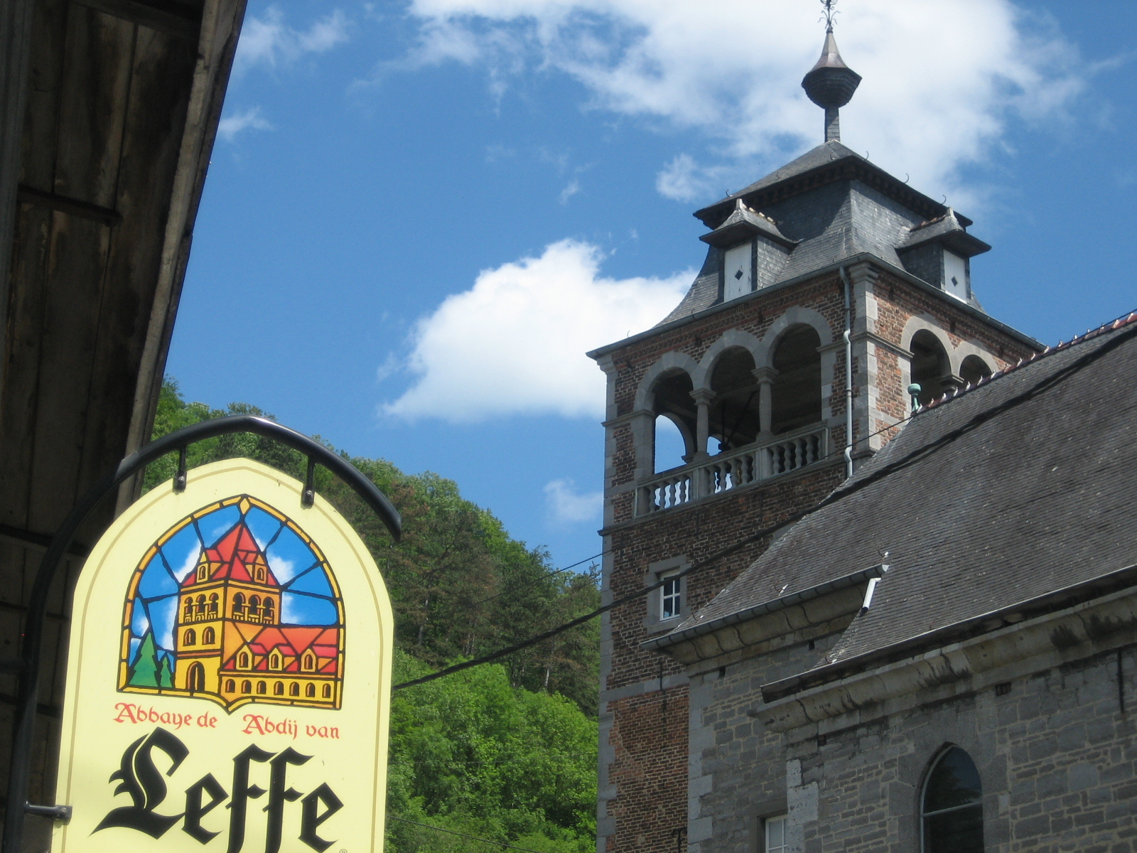 D'Abtei Notre-Dame vu Leffe, zu Dinant . 18. Juni 2007.